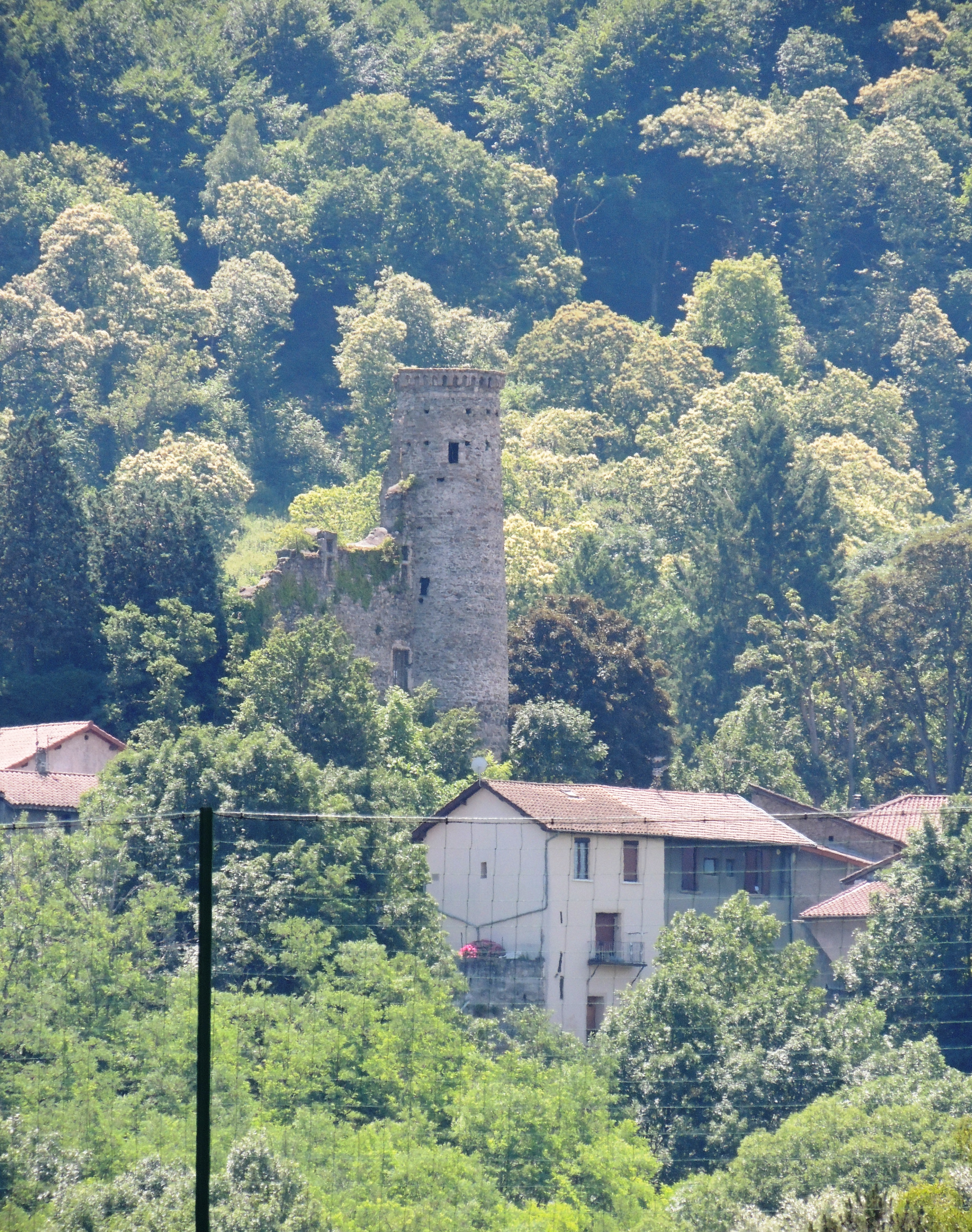 Vue de Champ-village, depuis le Complexe sportif.